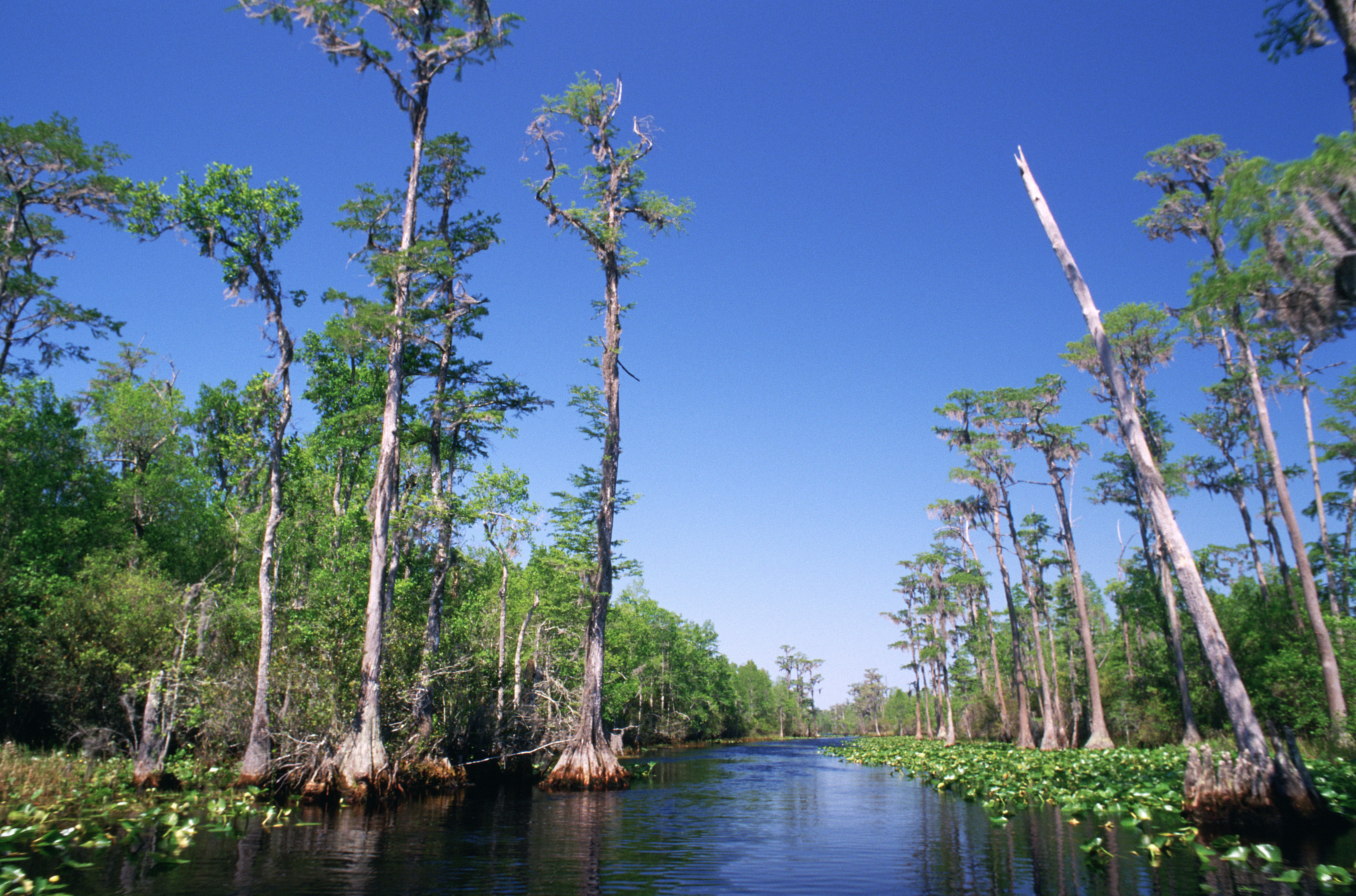 Bald Cypresses (Taxodium distichum) in Okefenokee Swamp